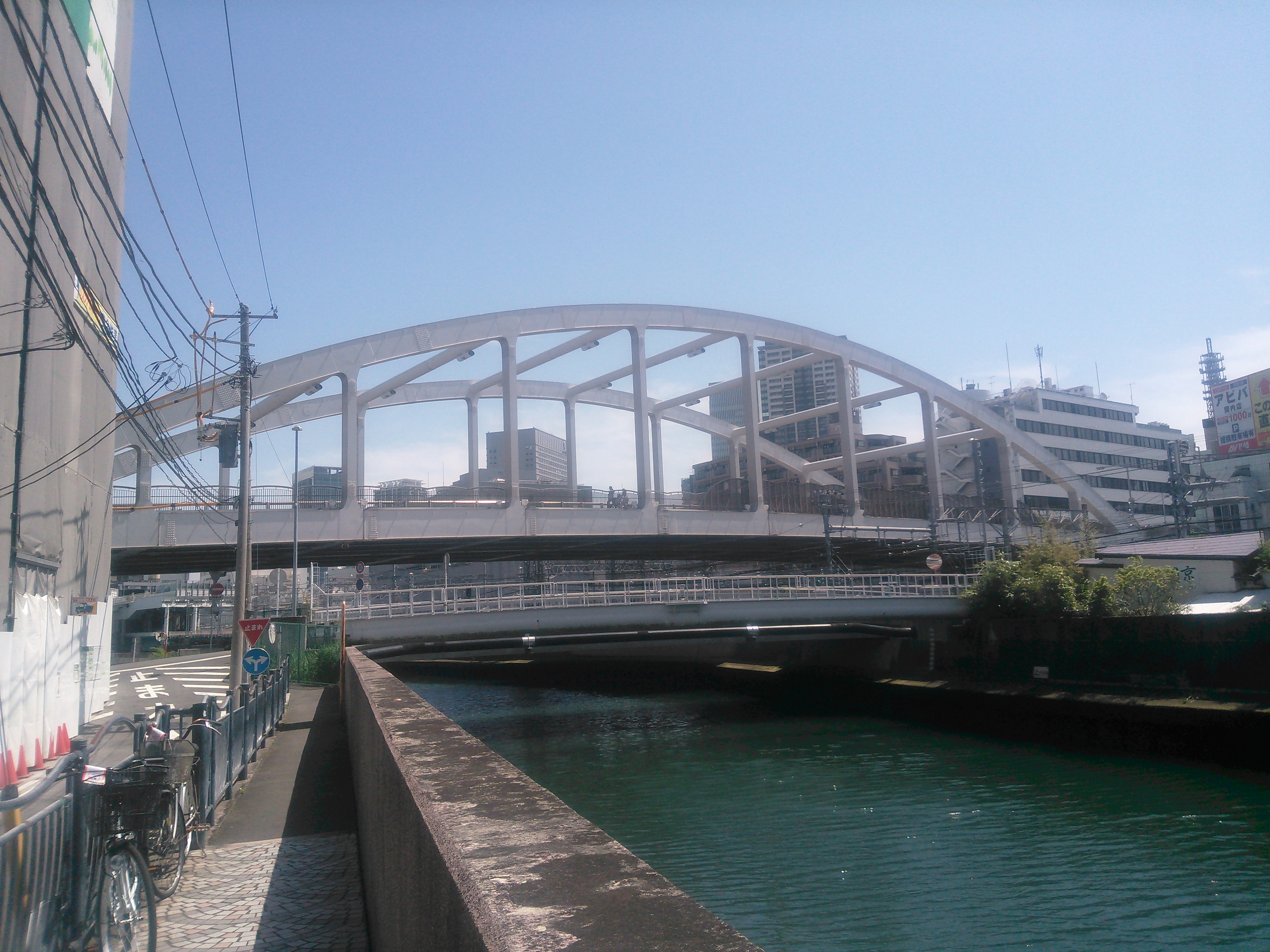 帷子川に架かる平沼橋。横浜市西区岡野1丁目から下流（東北東）の方向を見る。